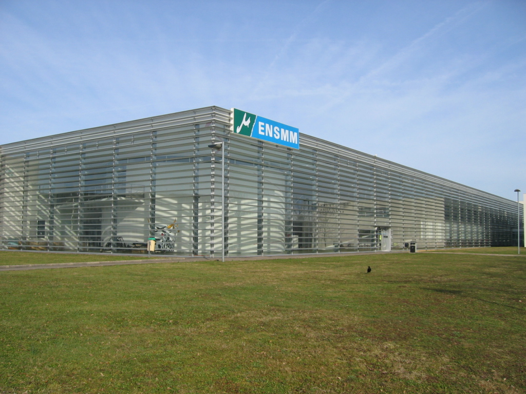 ENSMM - Ecole d'ingénieur en microtechnique de Besançon TEMIS